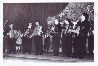 Orquestra Regional de Armónios de Faro, em 1959